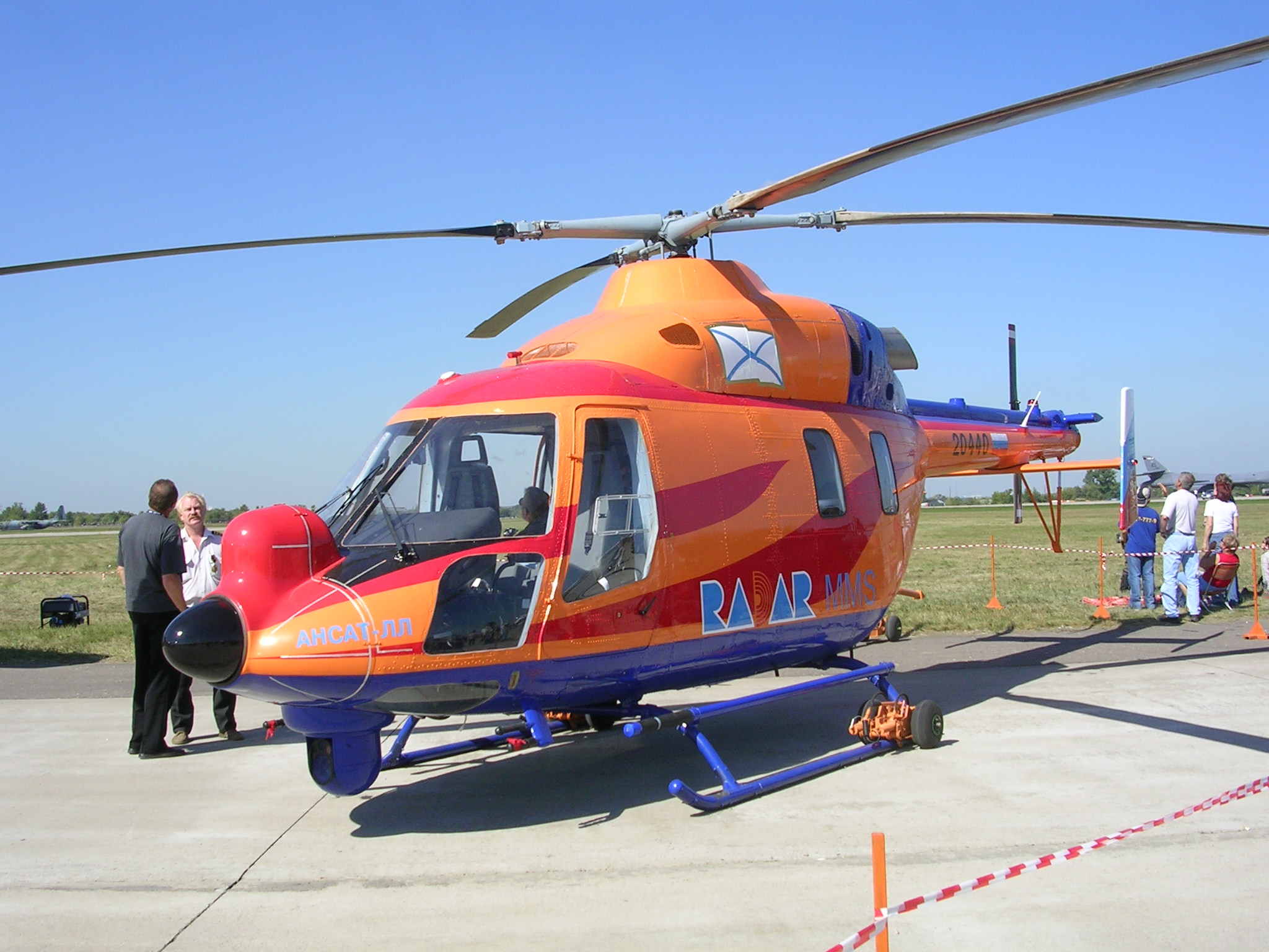 Летающая лаборатория на базе вертолёта Ансат